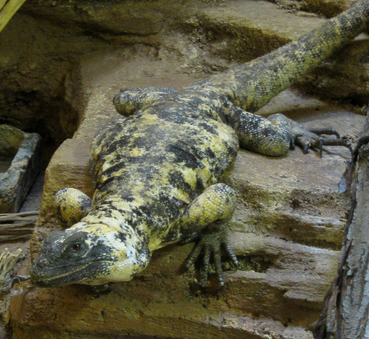 common agama lizard, Pueblo Zoo, Colorado / 2009